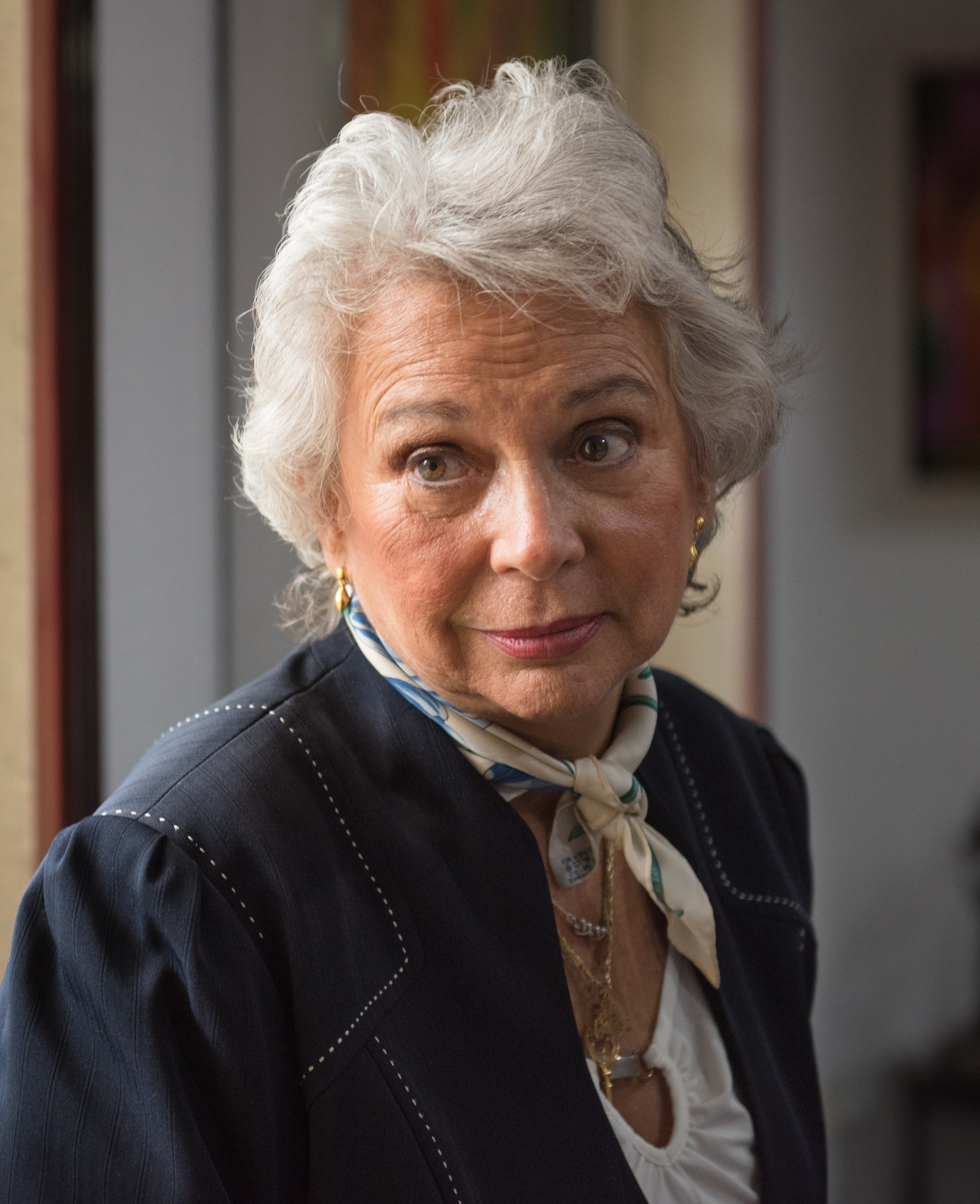 Olga Sánchez Cordero